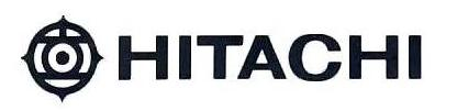 １９９１年前半まで使われていた、日立の旧ロゴマーク